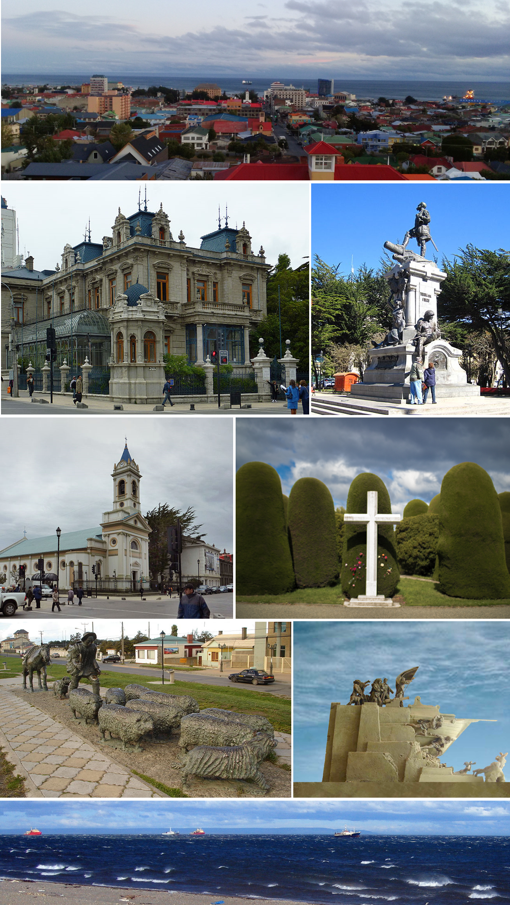 Imágenes de la ciudad de Punta Arenas. Trabajo derivado de: Plaza de Armas Estrecho de Magallanes Palacio Sara Braun Cementerio Municipal de la ciudad. Goleta Ancud El Ovejero Catedral de Punta Arenas Vista desde el Cerro La Cruz